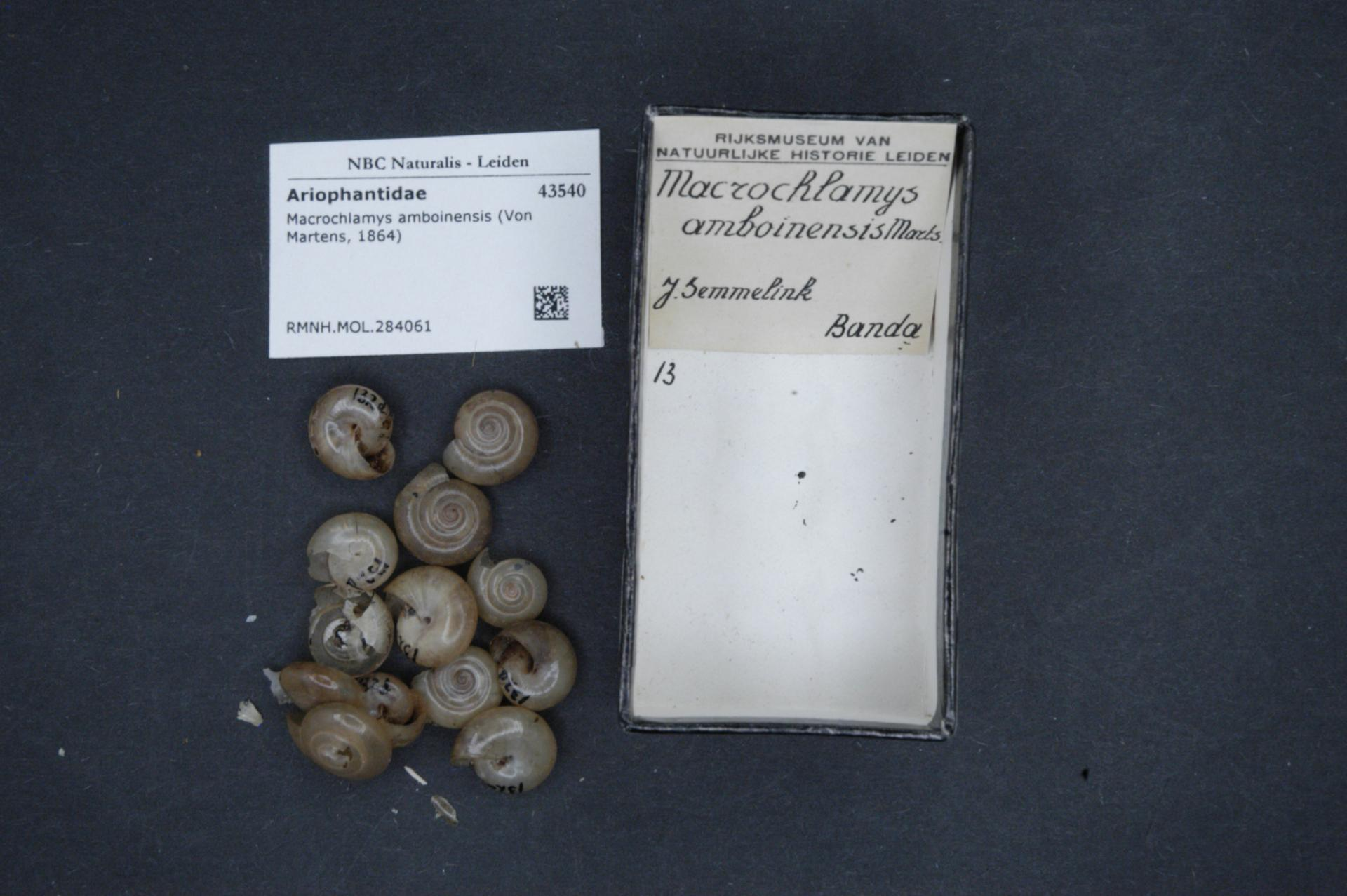 Macrochlamys amboinensis (Von Martens, 1864)